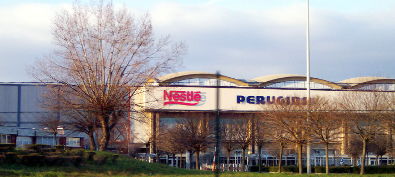 Perugia, l'esterno dell'azienda Nestlè-Perugina